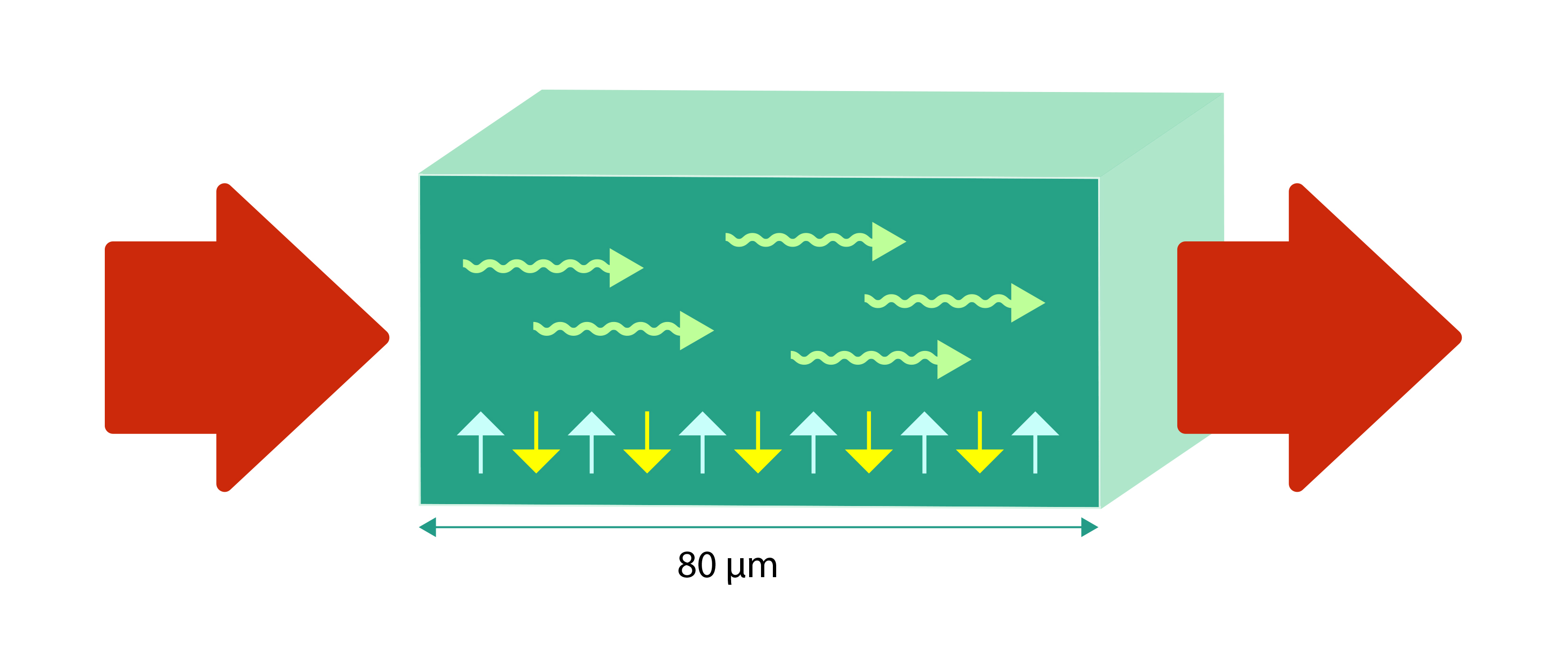 Illustrasjon viser elektrisk strøm der både elektroner og spinn flommer gjennom materialet.